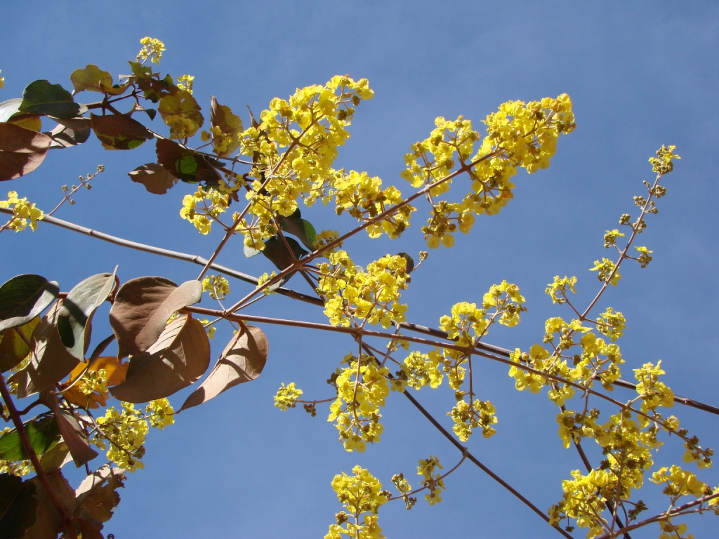 Banisteriopsis gardneriana - MALPIGHIACEAE Parque Nacional do Grande Sertão Veredas - Chapada Gaúcha - Minas Gerais - Brasil.